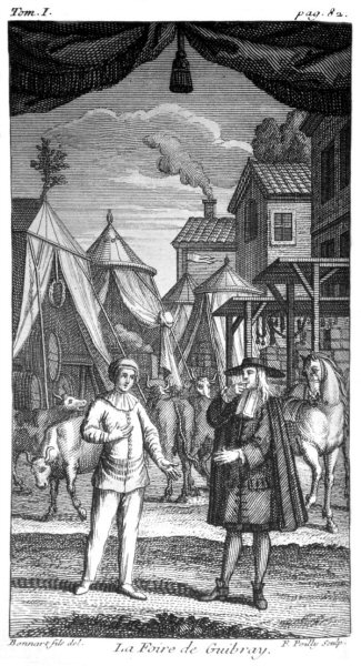 Le Sage et D'Orneval, 'La Foire de Guibray'